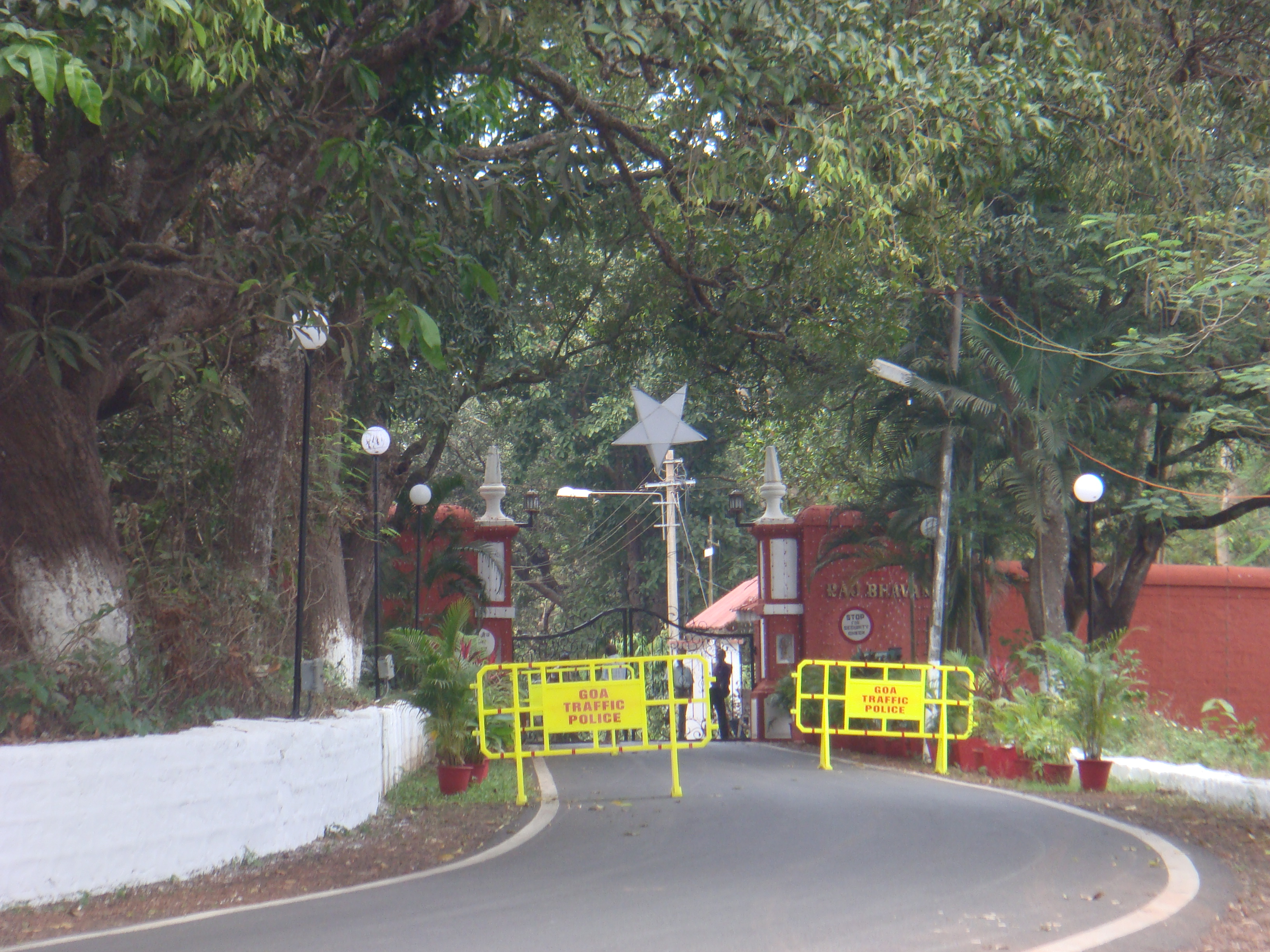 ഗോവ രാജ്ഭവൻ ഗേറ്റ്